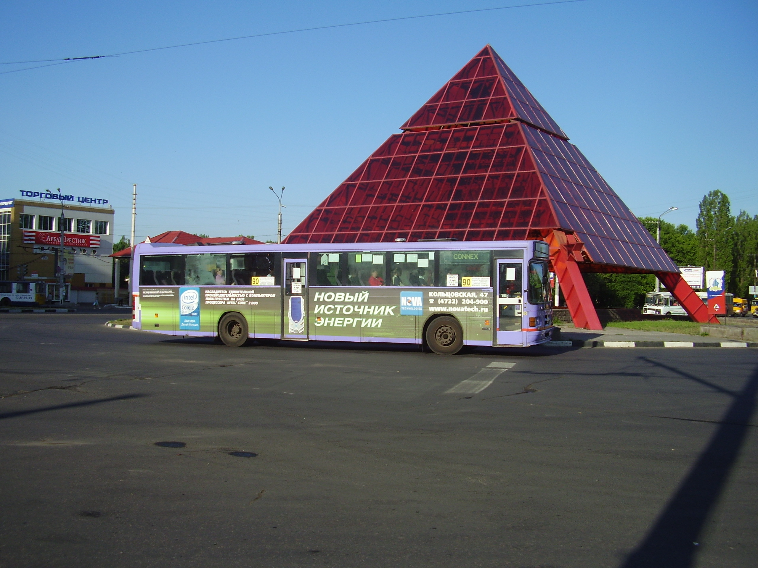 Автобус Volvo-Saffle,маршрут N90 в Воронеже